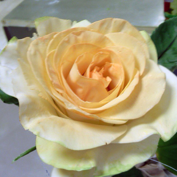 Aus Blütenpaste (Gum Paste) hersgestellte Blume.